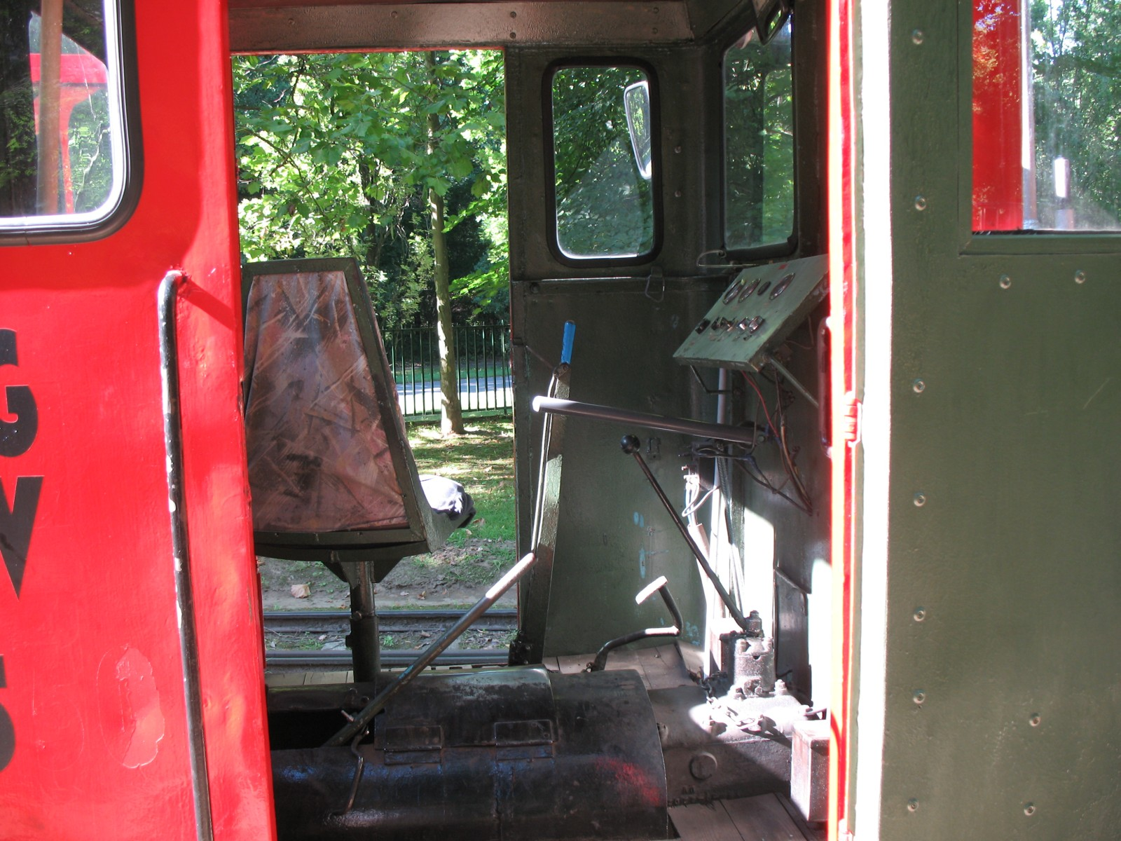 Ez a kép a debreceni állatkertben található kisvasut mozdonyának belsejét mutatja be. Jól látható a vezető forgószéke, az itányítópult és egy kar, amit nem tudom mi. Én fékre tippelek.